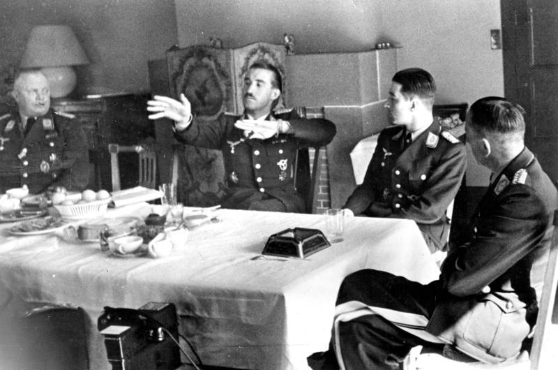 Geburtstag Theo Osterkamp, Gäste ADN-ZB/Archiv II. Weltkrieg 1939-45 Während des Geburtstagsempfangs im Mai 1941 bei Generalleutnant Theodor Osterkamp (r.) schildert der Jagdflieger der deutschen Luftwaffe, Oberstleutnant Adolf Galland (2.v.l.) einen Luftkampf; 2.v.r. Oberstleutnant Werner Mölders. (Dreesen) 10443-41 [Empfang zum 49. Geburtstag (15.4.1892) von Theodor Osterkamp.- vlnr: N.N., Adolf Galland, Werner Mölders, Theodor Osterkamp] Abgebildete Personen: Galland, Adolf: Generalmajor, Inspekteur der Jagdflieger, Ritterkreuz (RK), Luftwaffe, Deutschland (GND 11853727X) Mölders, Werner: Oberst, Ritterkreuz (RK), Luftwaffe, Deutschland (GND 11858300X) Osterkamp, Theodor: Generalmajor, Ritterkreuz (RK), Luftwaffe, Orden Pour le mérite, Deutschland (GND 124745822)